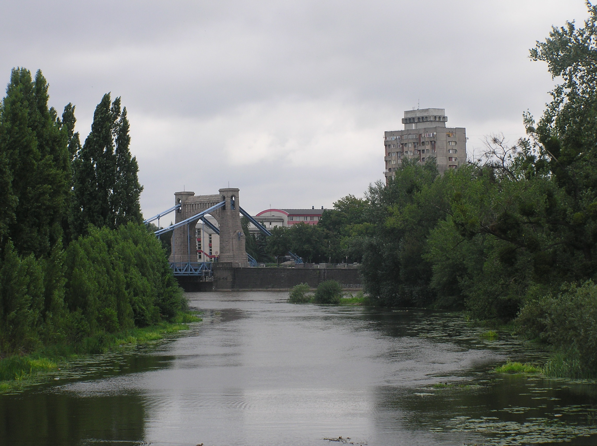 Ujście Oławy